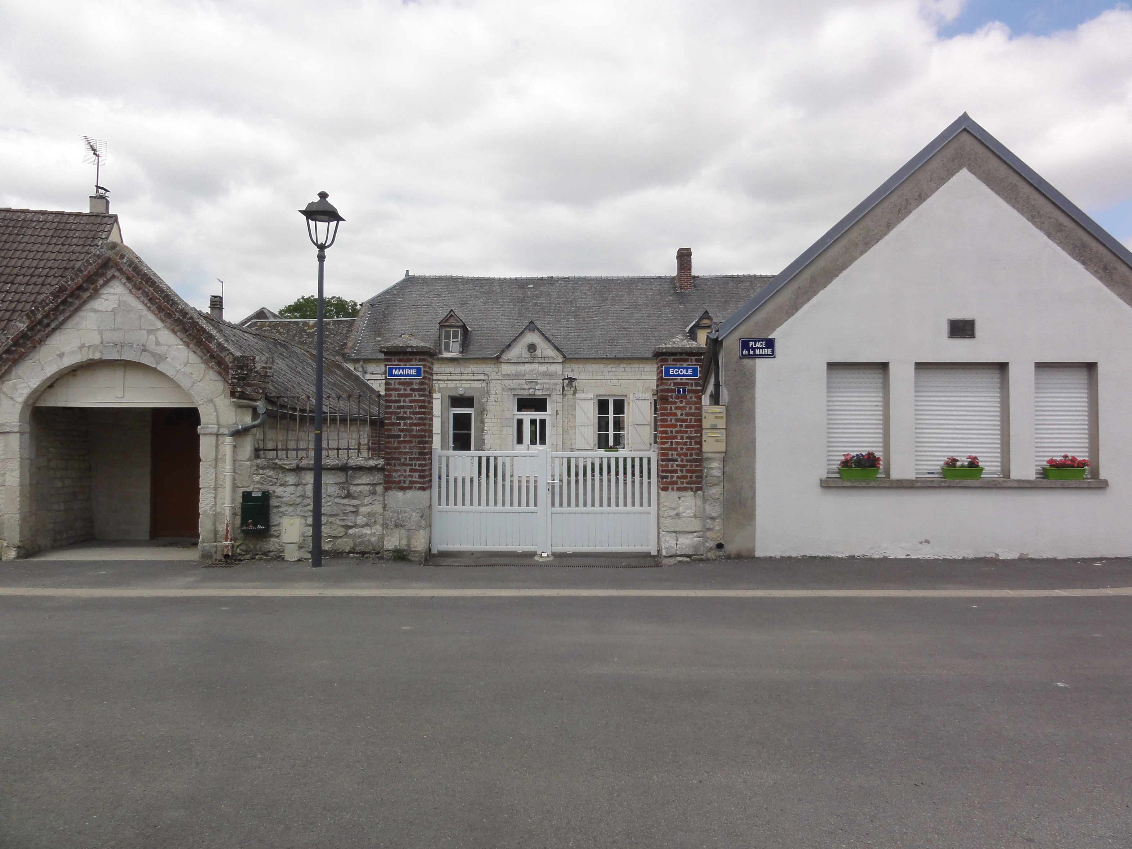 Goudelancourt-lès-Pierrepont (Aisne) mairie-école